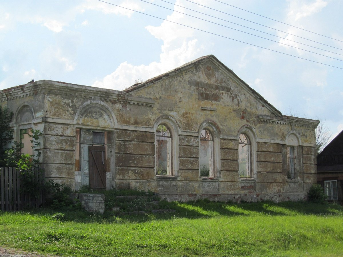 Уваравічы. Будынак сталовай